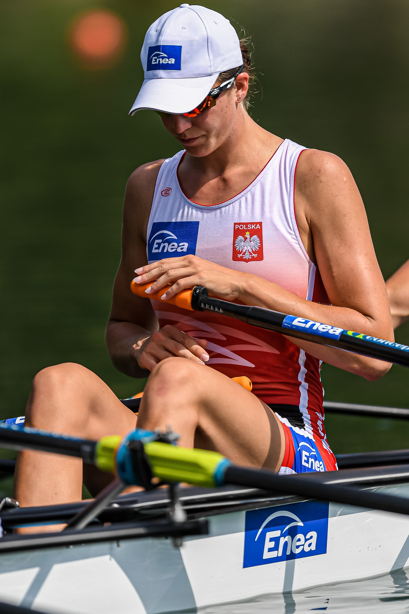 Polska wioślarka Marta Wieliczko na czwórce podwójnej podczas zawodów w 2019 roku